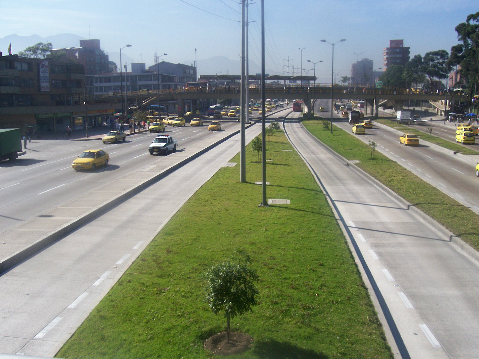 Carrera 30 (Avenida NQS) and Calle 45, Bogotá, Colombia, during 2007 Car Free Day